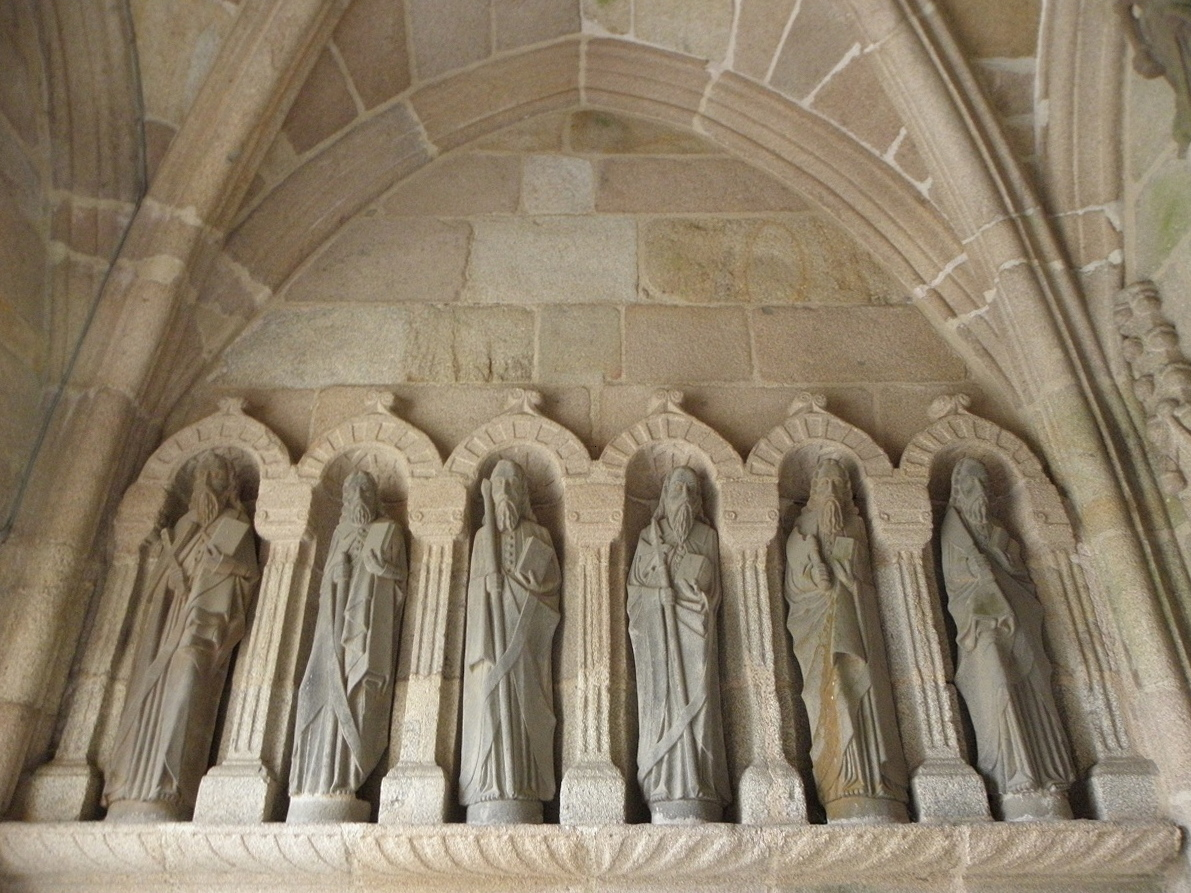 Ébrasement gauche du porche méridional de l'église Saint-Efflam à Plestin-les-Grèves (22).